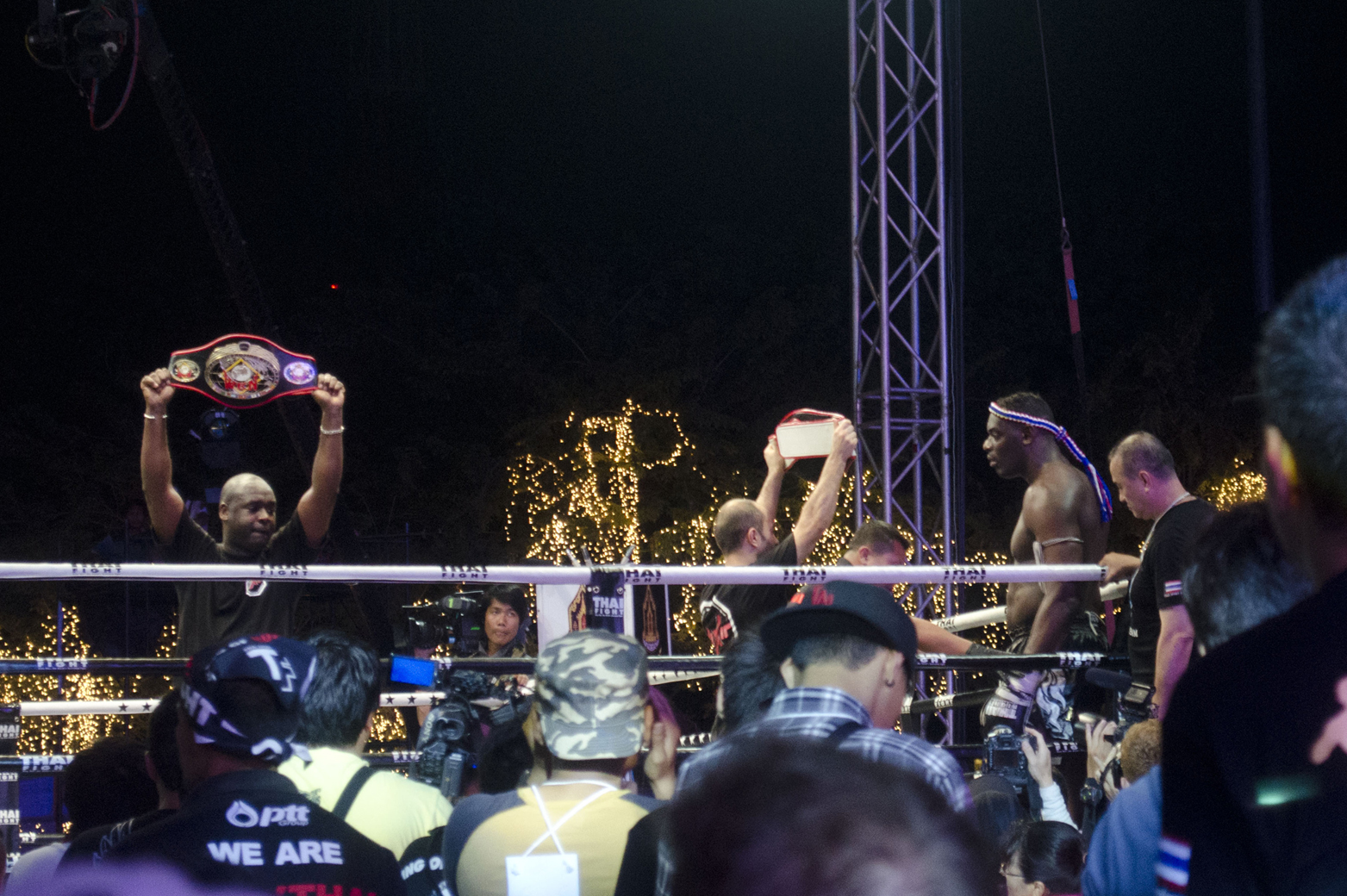 Patrice Quarteron